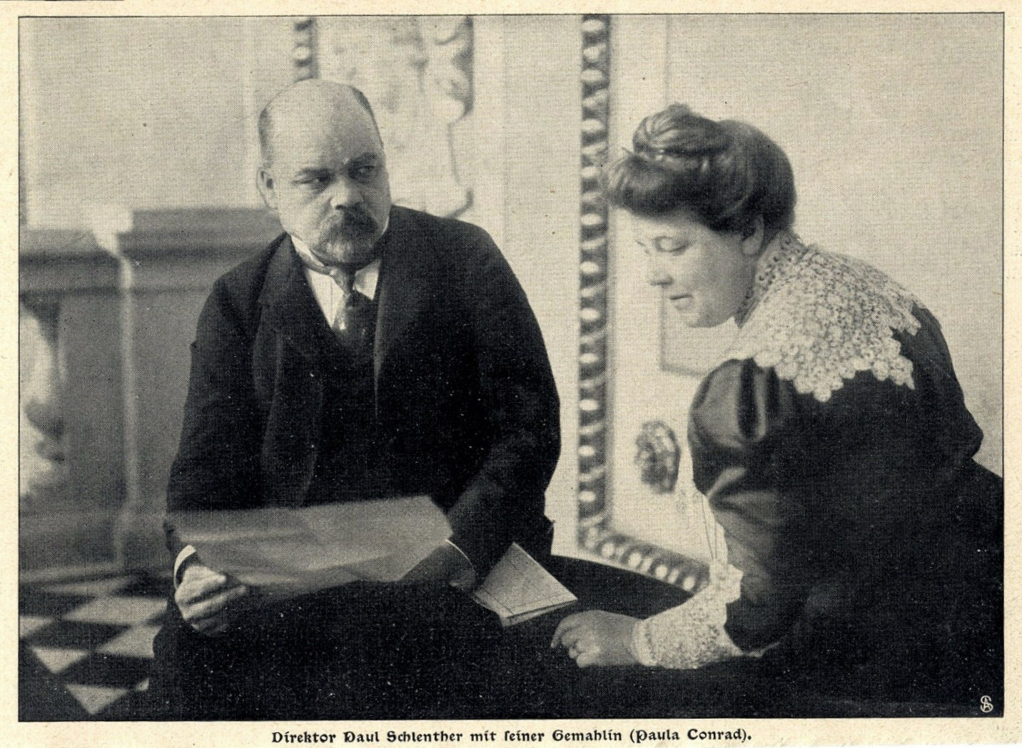 Paul Schlenther, Direktor des Wiener Burgtheaters, mit seiner Gemahlin Paula Conrad, 1906